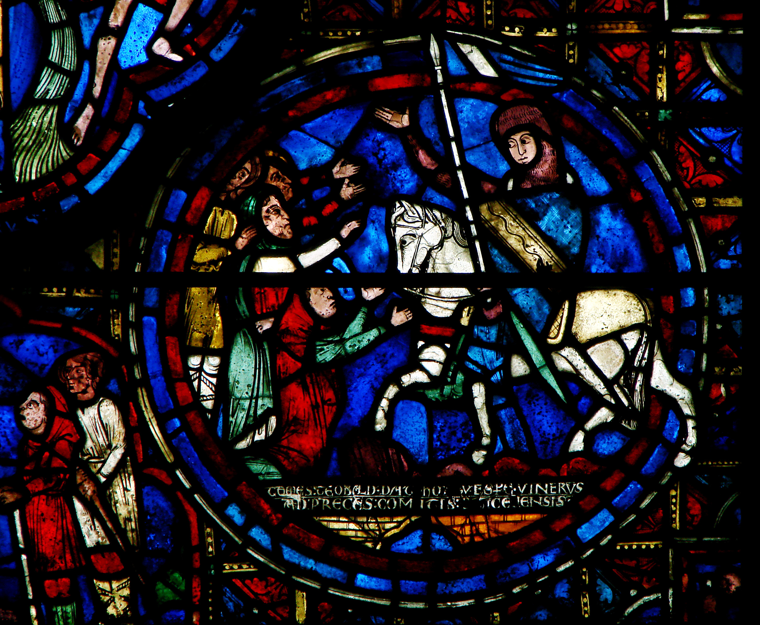 Détail d'un vitrail de la Cathédrale Notre-Dame de Chartres.